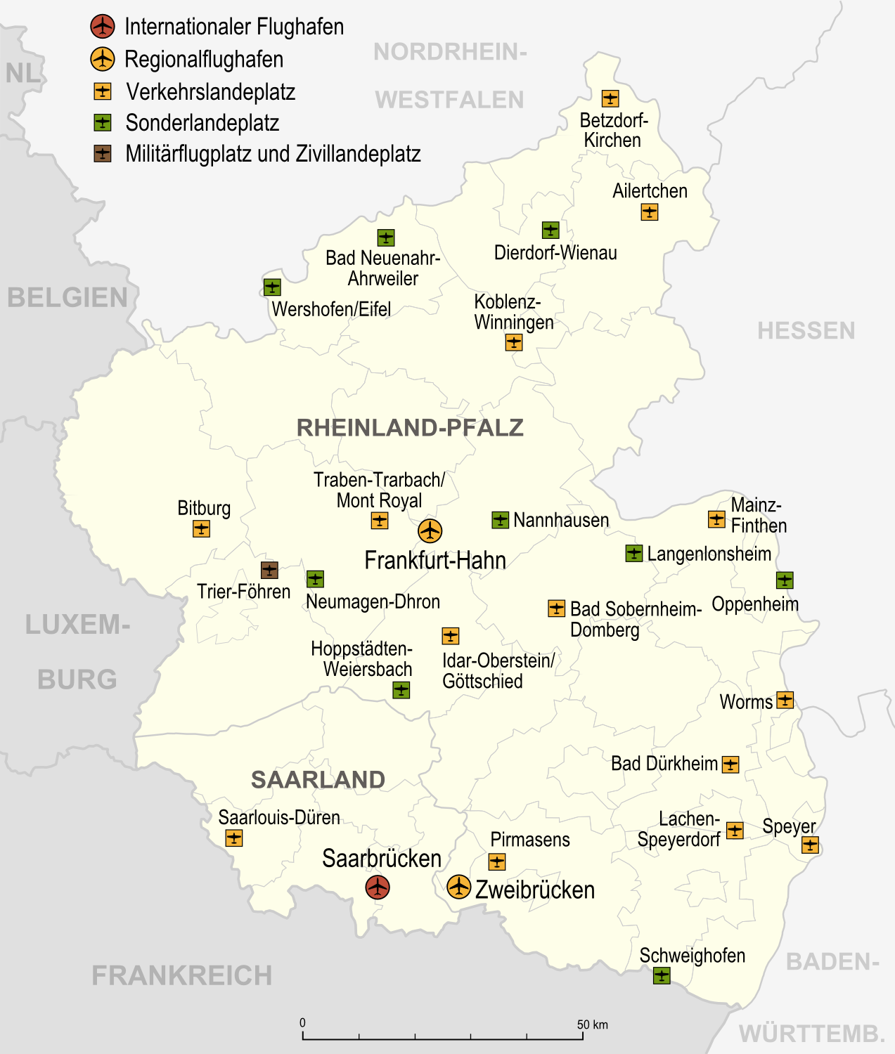 Flughäfen, Verkehrslandeplätze und Sonderlandeplätze in Rheinland-Pfalz, Stand 2007